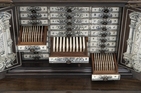 Ábaco neperiano (Barroco). Número de inventario: 52698.